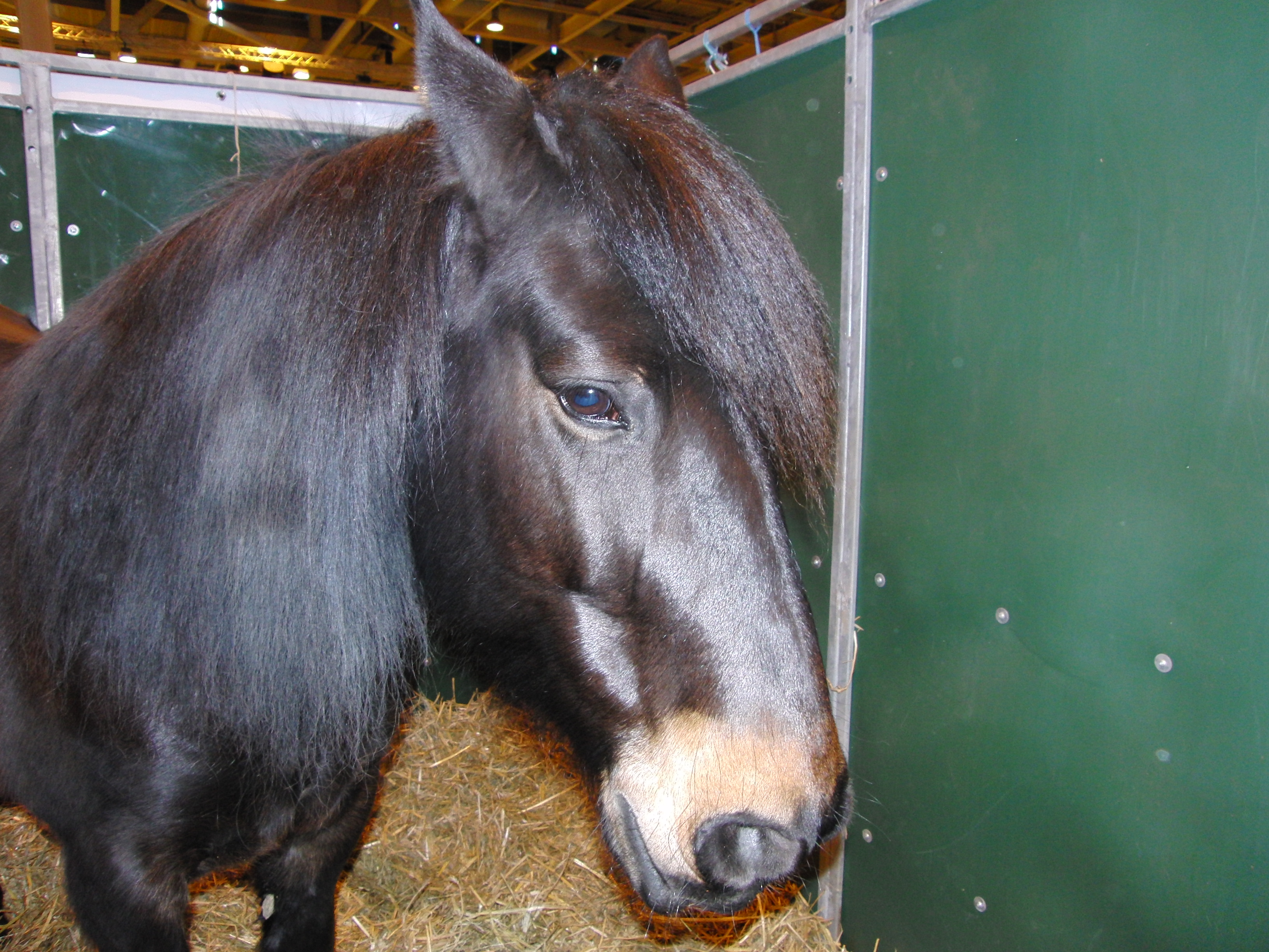 Cheval Castillonnais - Salon de l'Agriculture 2010